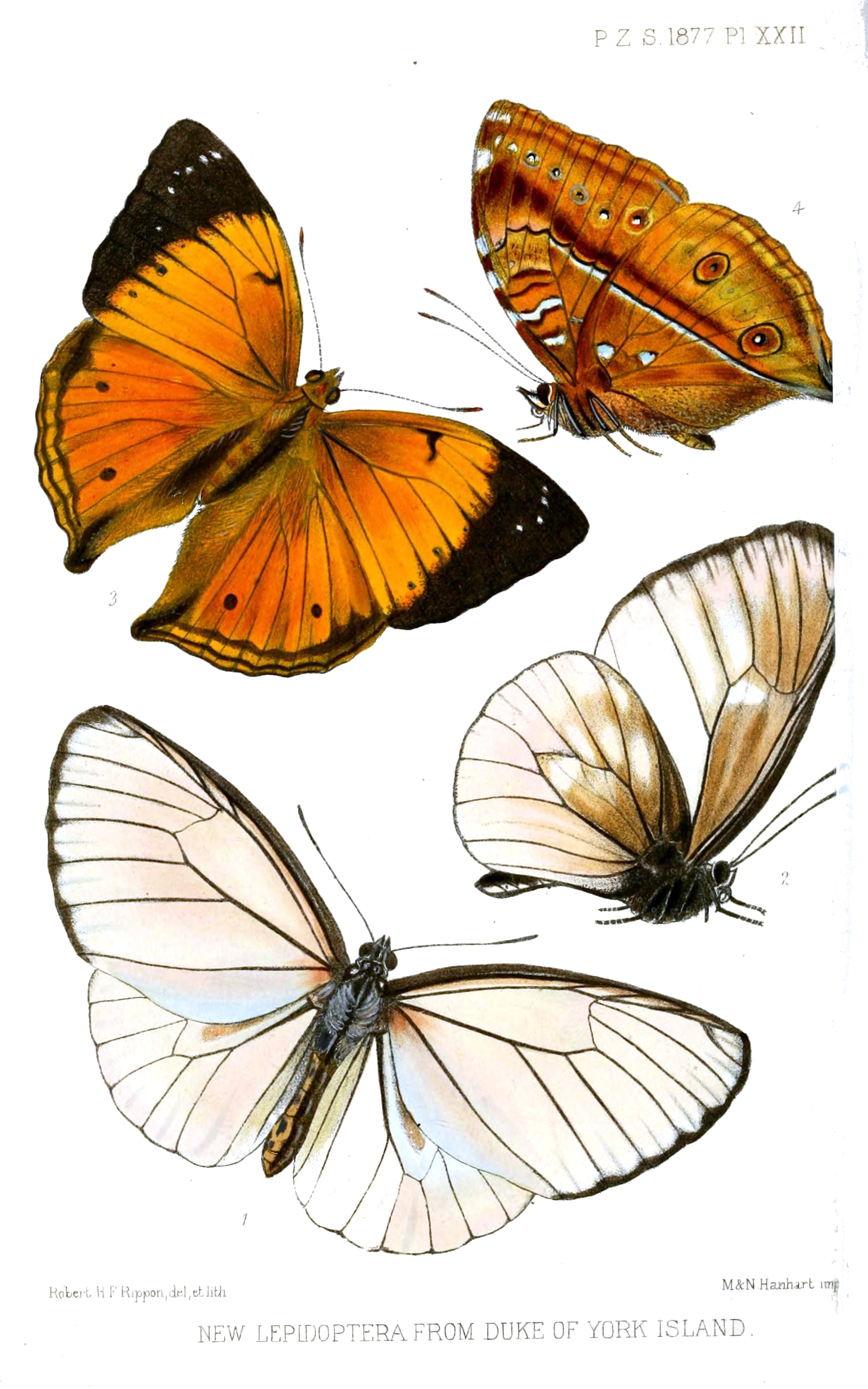 1 2 Euploea browni 3 4 Doleschallia browni